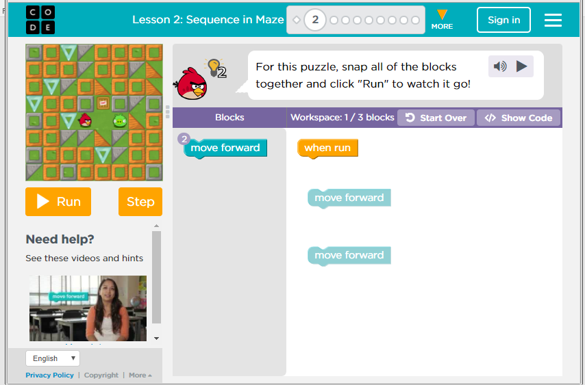 การใช้งาน